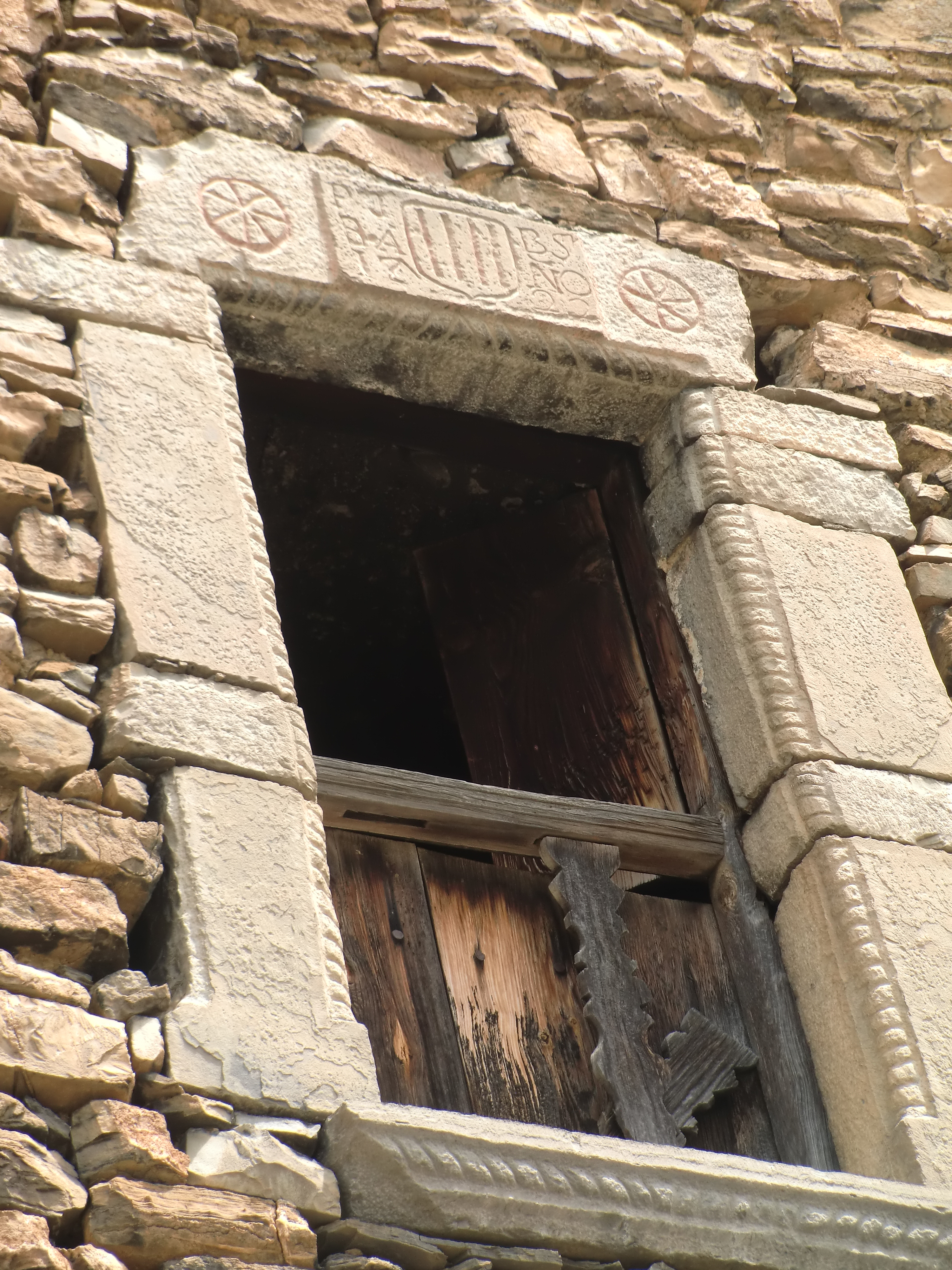 Escudo sobre balcón de madera en Casa del Señor de Fanlo (Huesca)